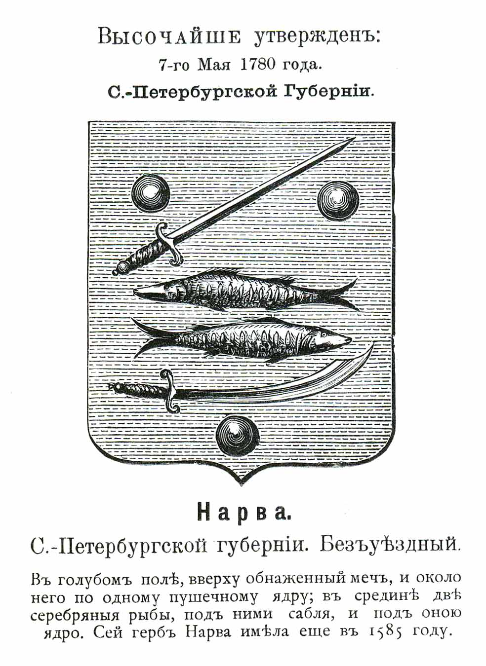 Official Russian Empire coat of arms Narva. Герб Российской Империи безъуездного города Нарва СПб губернии с официальным описанием в Гербовнике Винклера.